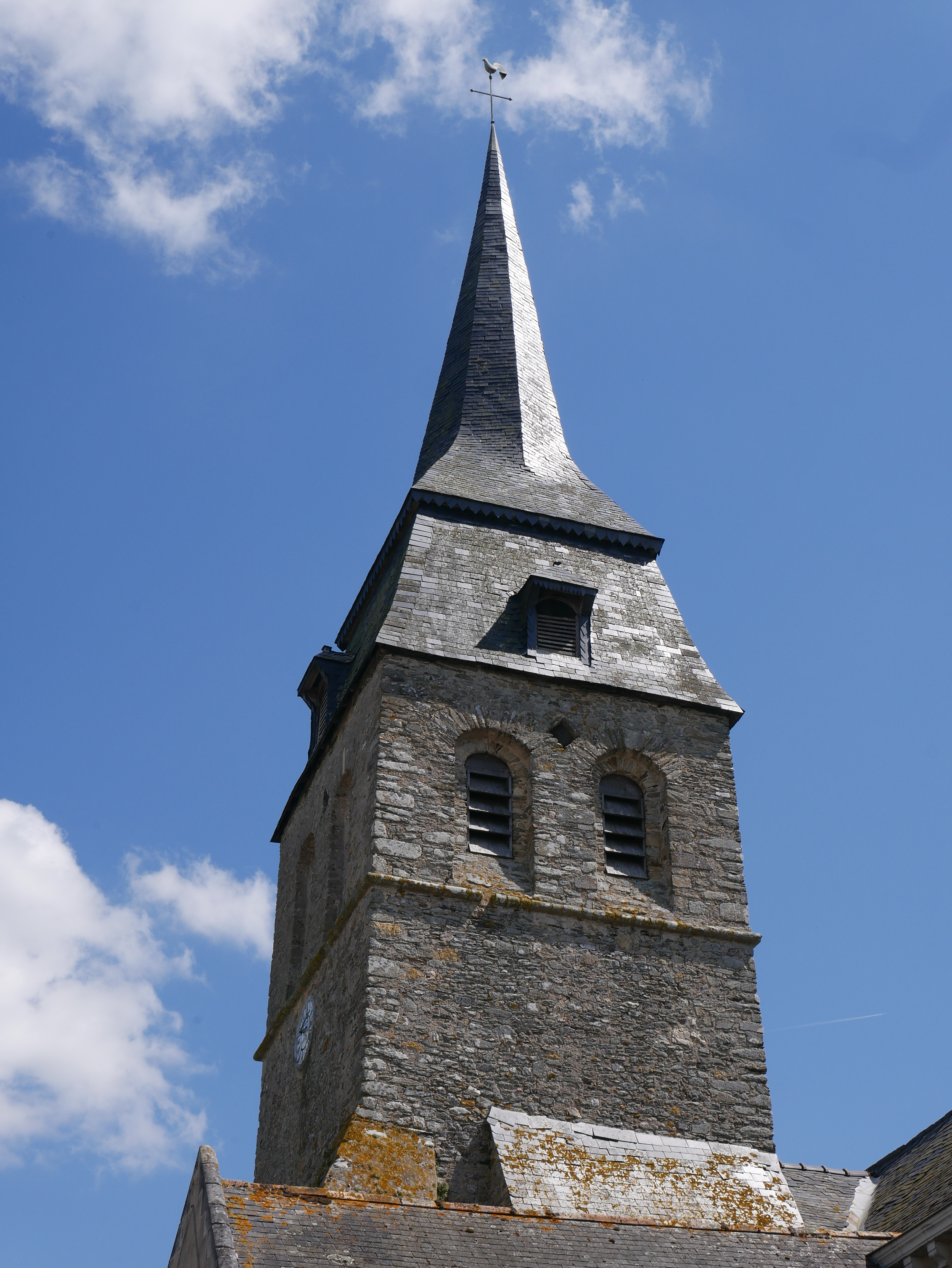 Clocher de l'église Saint-Pierre de Cherré (Maine-et-Loire, France).